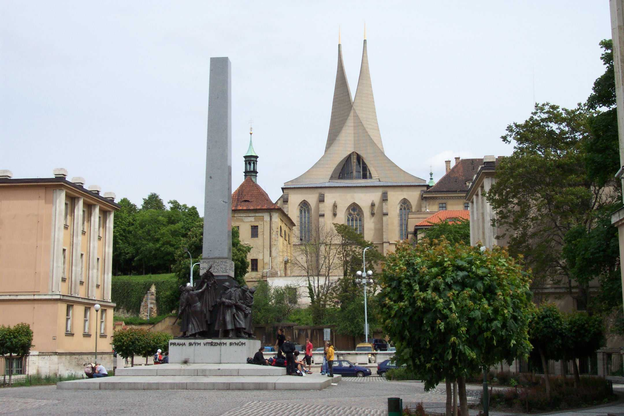 Emauzy church in Prague - Kostel Emauzy v Praze